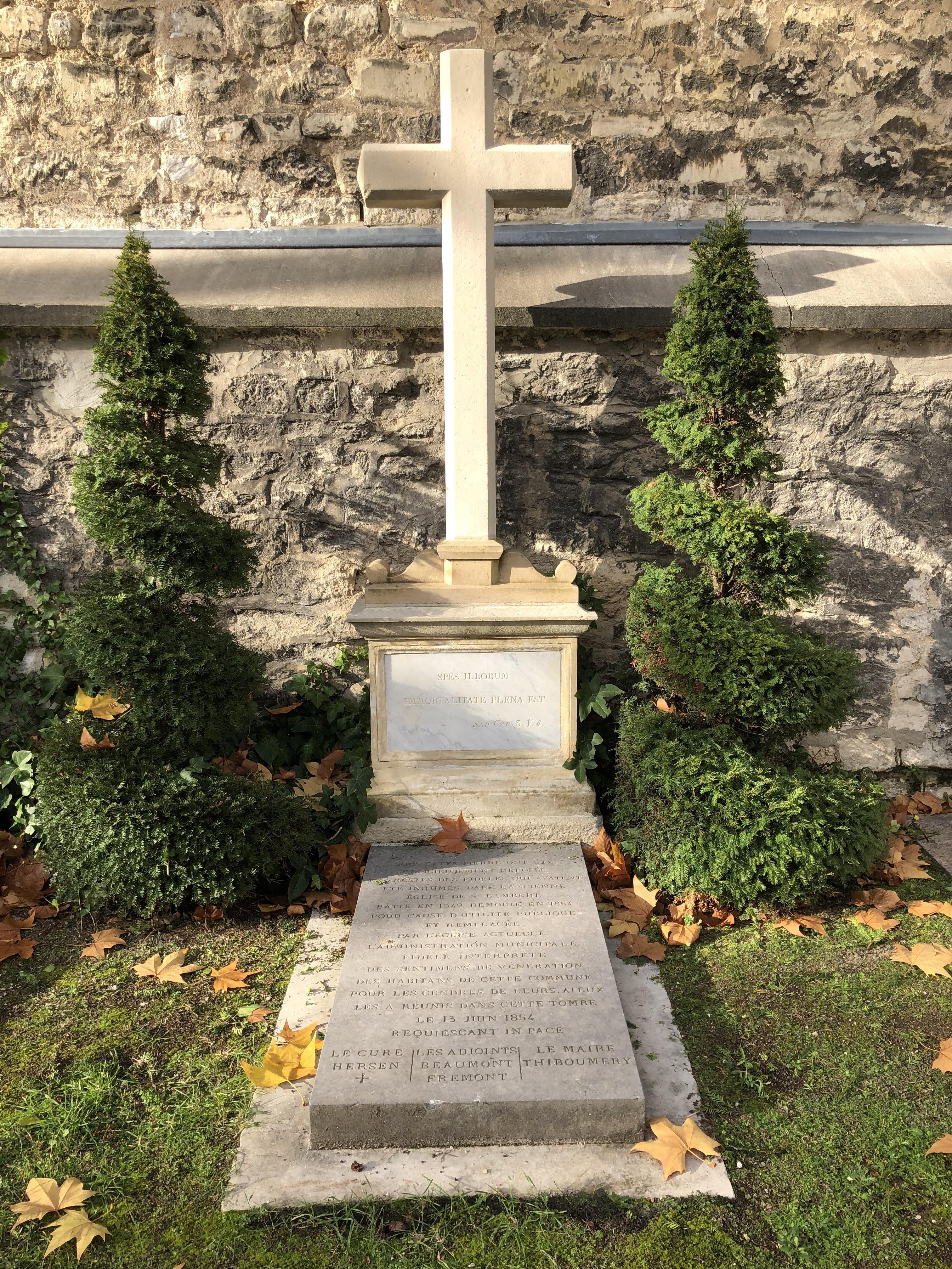 Cimetière de Vaugirard (Paris). Caveau contenant les ossements découverts lors de la destruction de l'ancienne église Saint-Lambert.